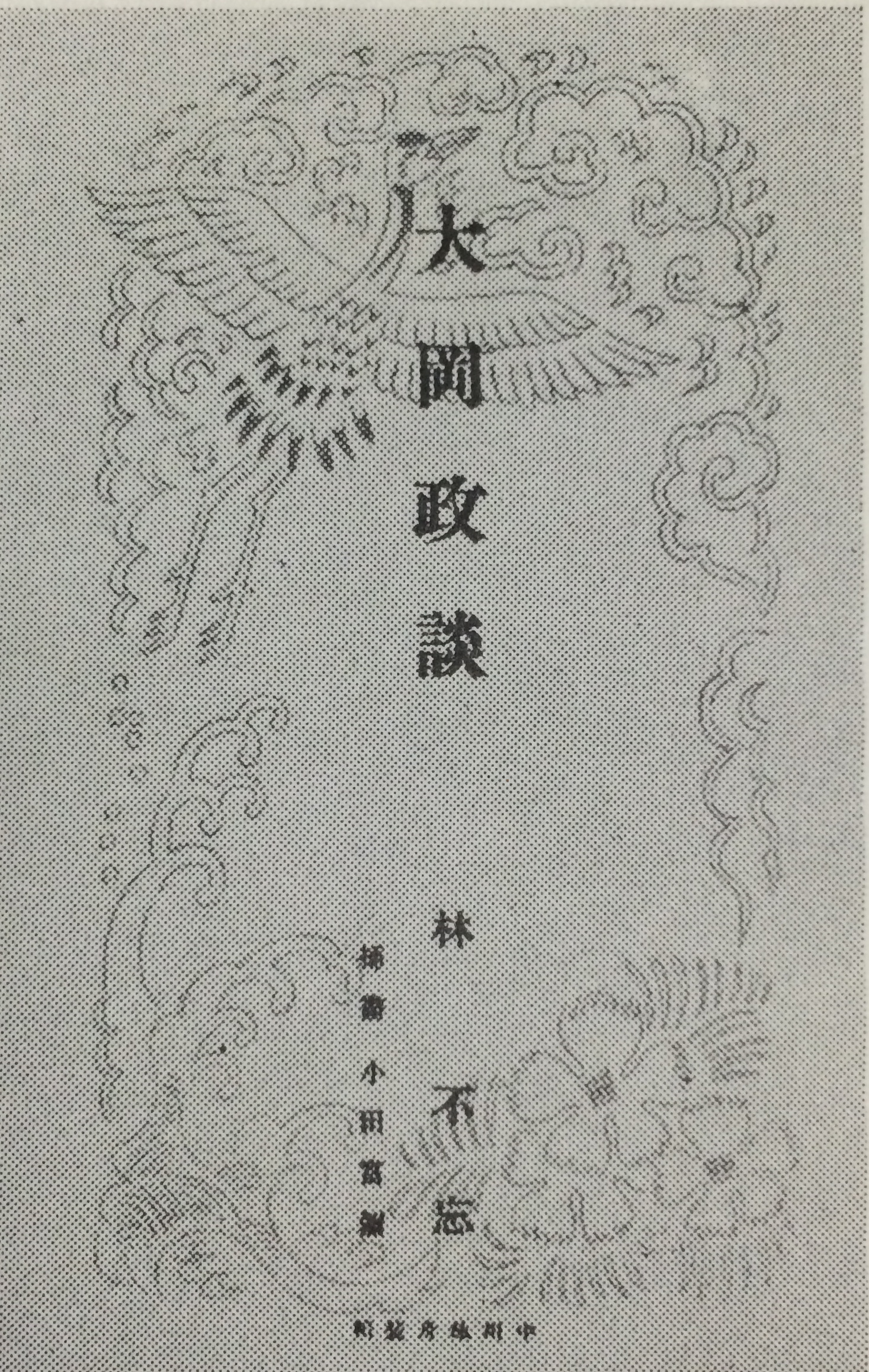 林不忘（長谷川海太郎）『新大岡政談』